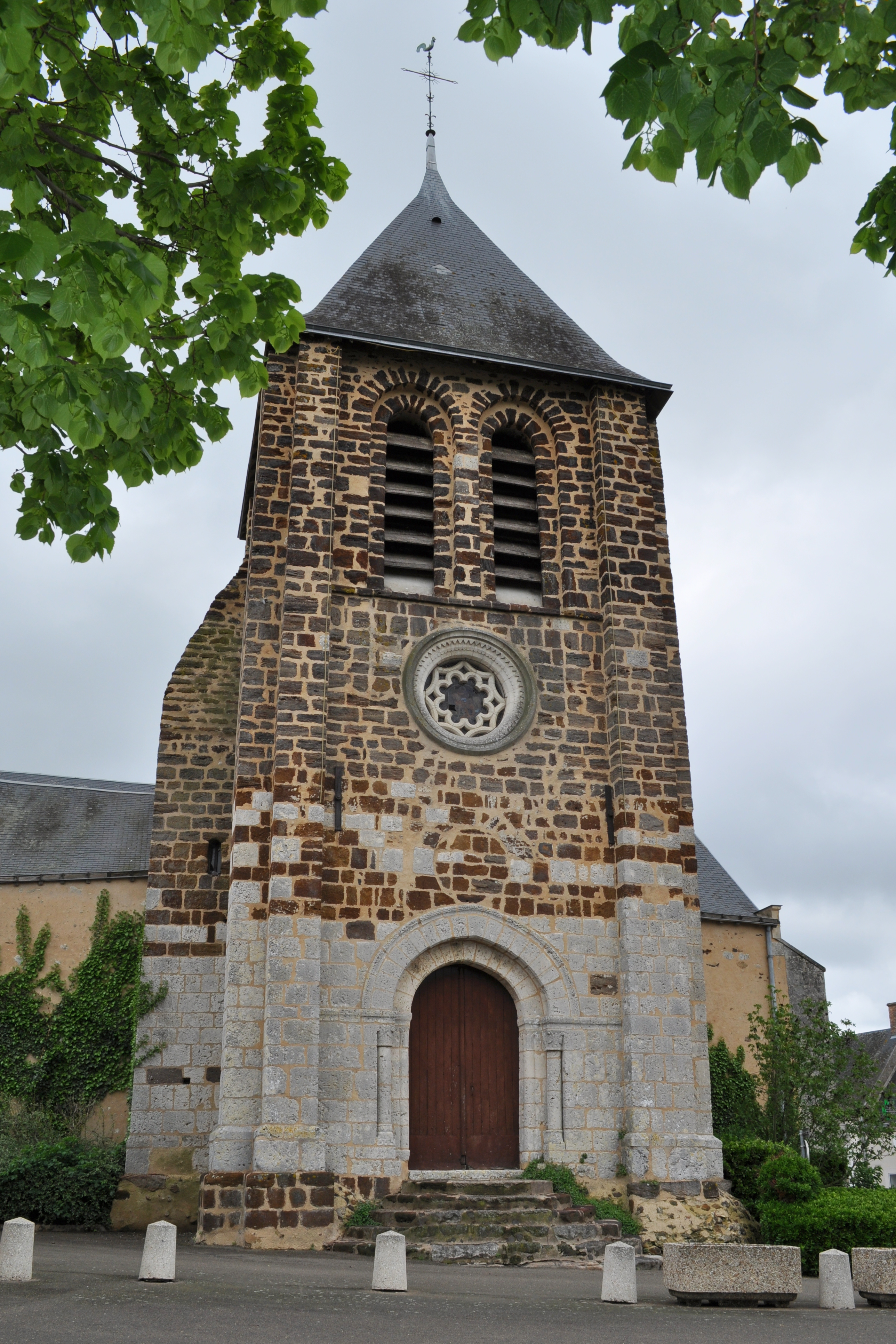 Eglise Saint-Martin d'Yvré-le-Pôlin (Sarthe)